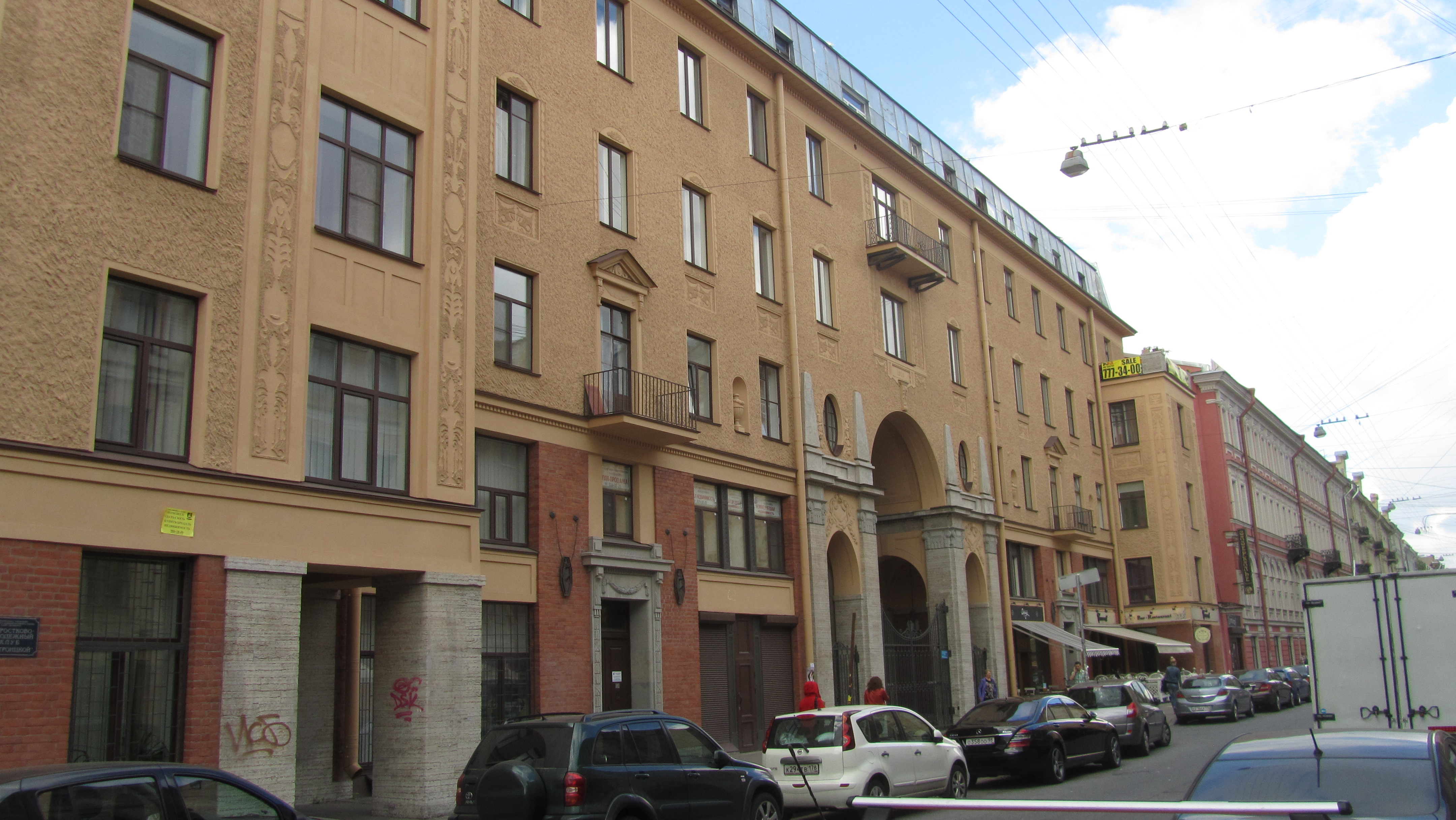 Доходный дом Толстого М. П. (Санкт-Петербург и Лен.область, Санкт-Петербург, набережная реки Фонтанки, 54; улица Рубинштейна, 15-17)